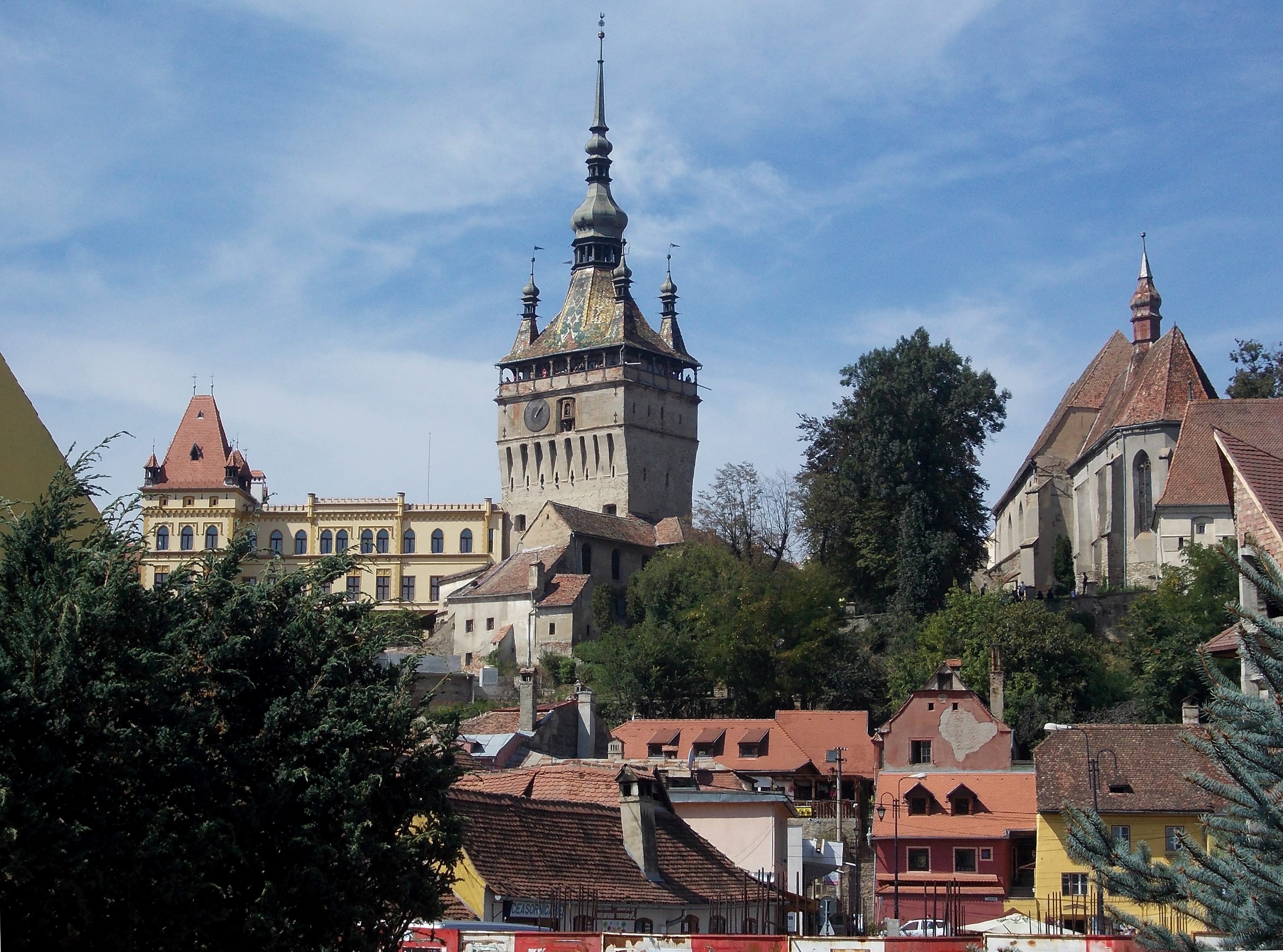 Ansamblu fortificații: intrarea fortificată, Turnul cu Ceas, Turnul Tăbăcarilor, Turnul Cositorarilor, Turnul Frânghierilor, Turnul Măcelarilor și Bastionul Castaldo, Turnul Cojocarilor, Turnul Croitorilor, Turnul Cizmarilor, Turnul fierarilor, curtinele